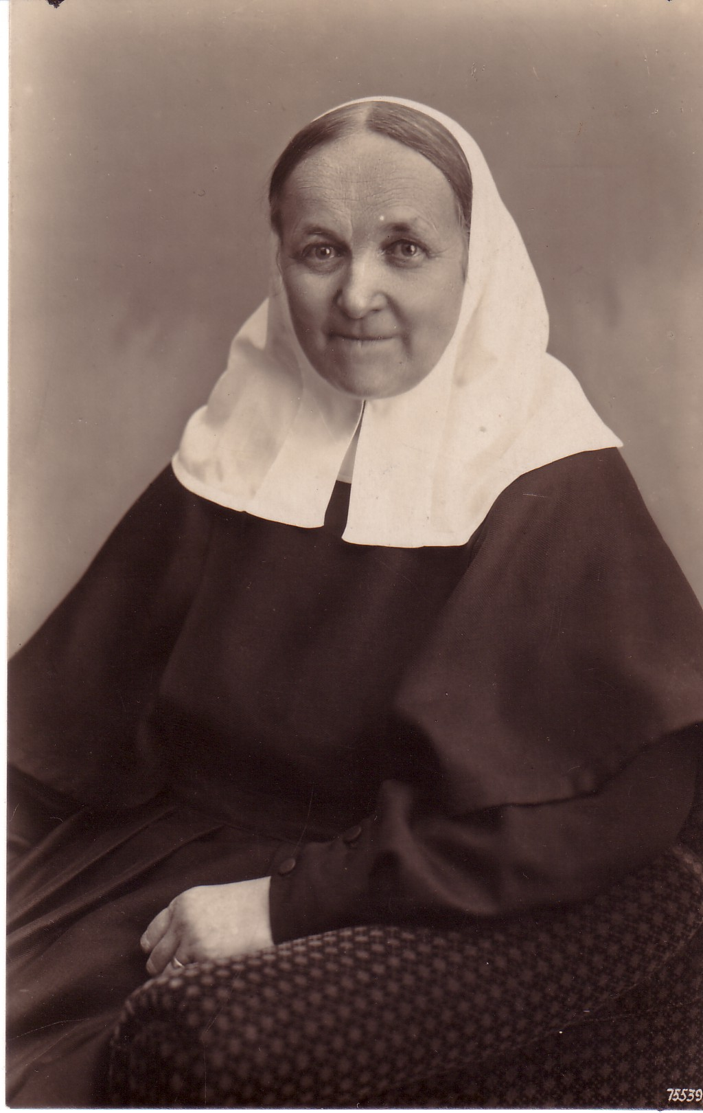 Eva von Tiele-Winckler (1866-1930) - Matka Ewa z Miechowic